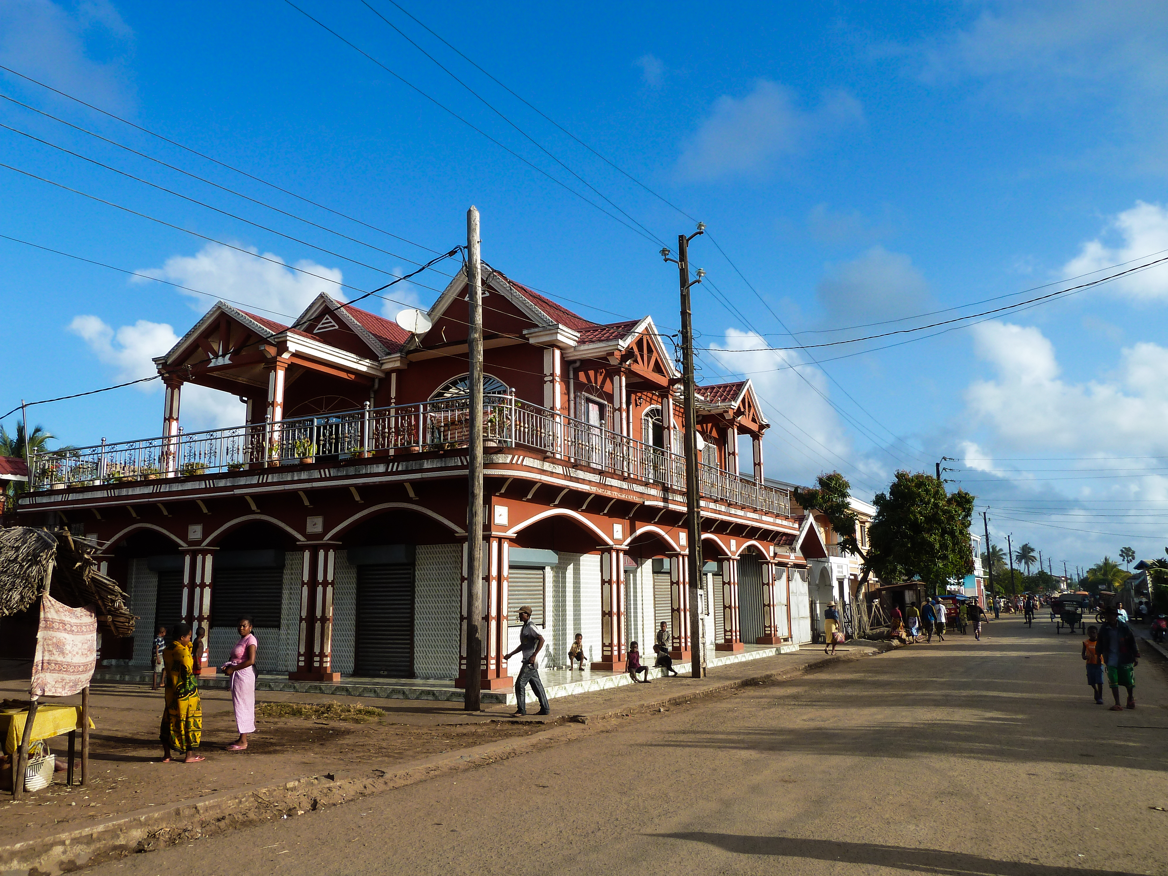 Huis langs de boulevard van Mananjary naar het noorden